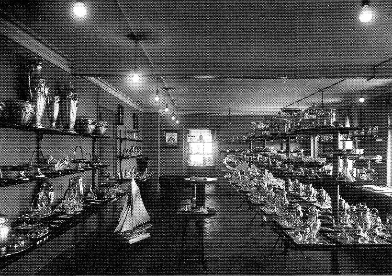 Musterzimmer von F. W. Quist im Esslinger Firmengebäude